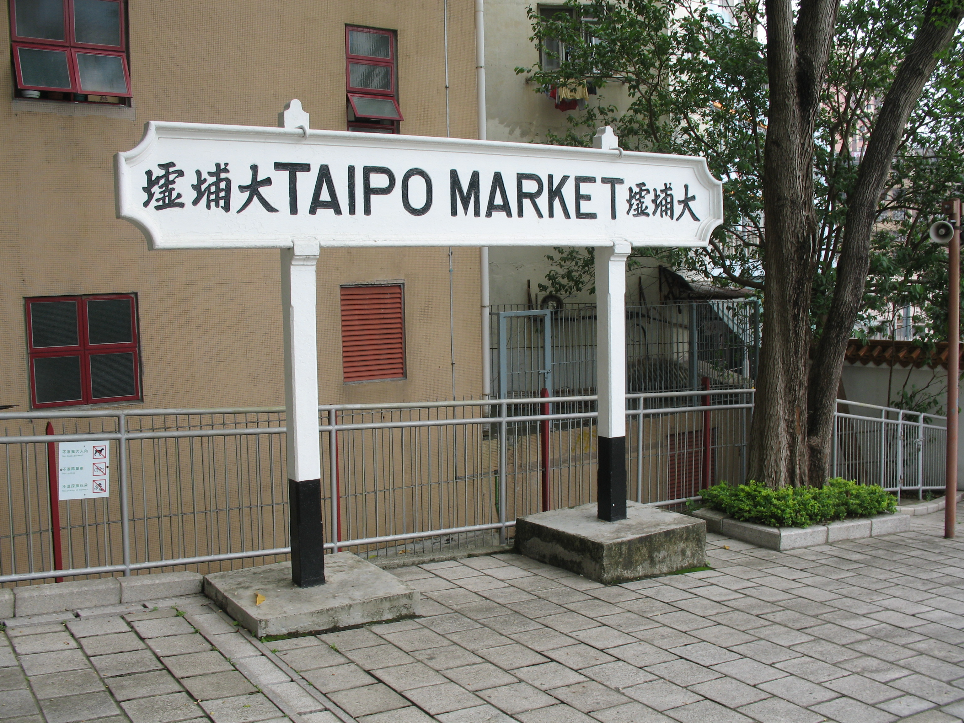 香港鐵路博物館舊大埔墟站站牌